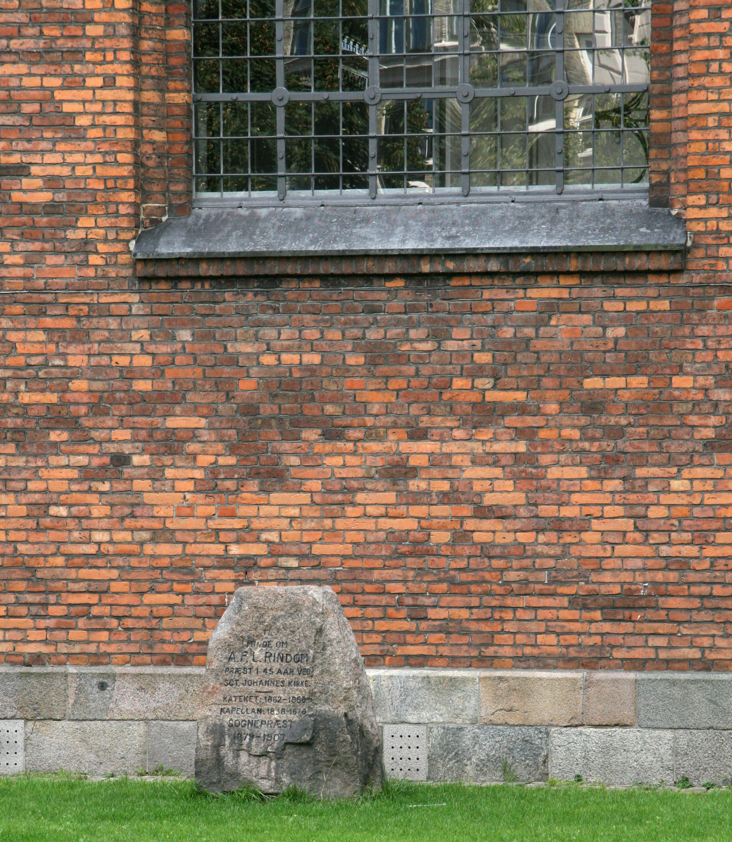 Sankt Johannes Kirke, Copenhagen, Denmark. Memorial for Rindom